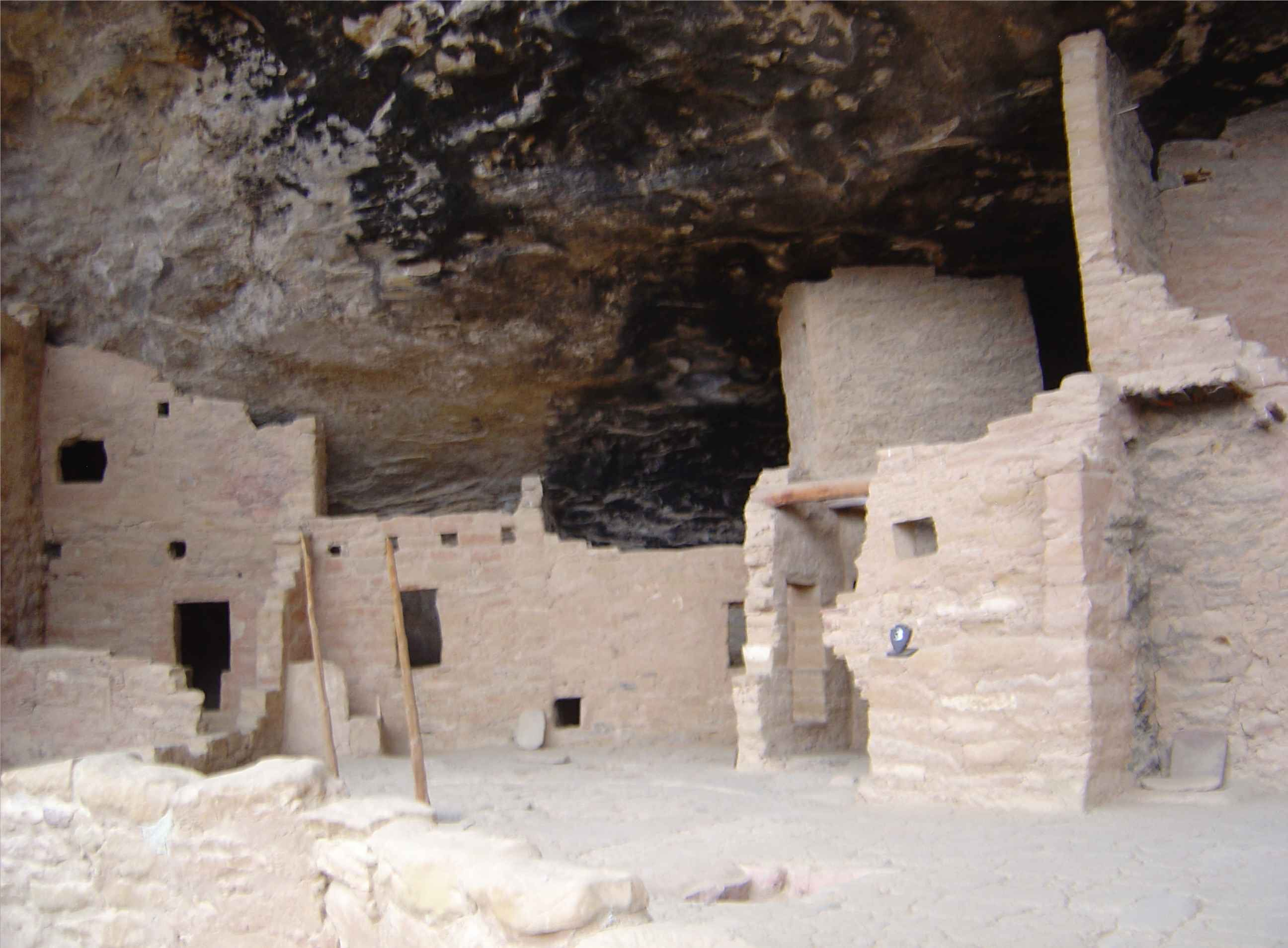 Spruce Tree House Mesa Verde National Park USA 2006 Auteur : R. BENEZET